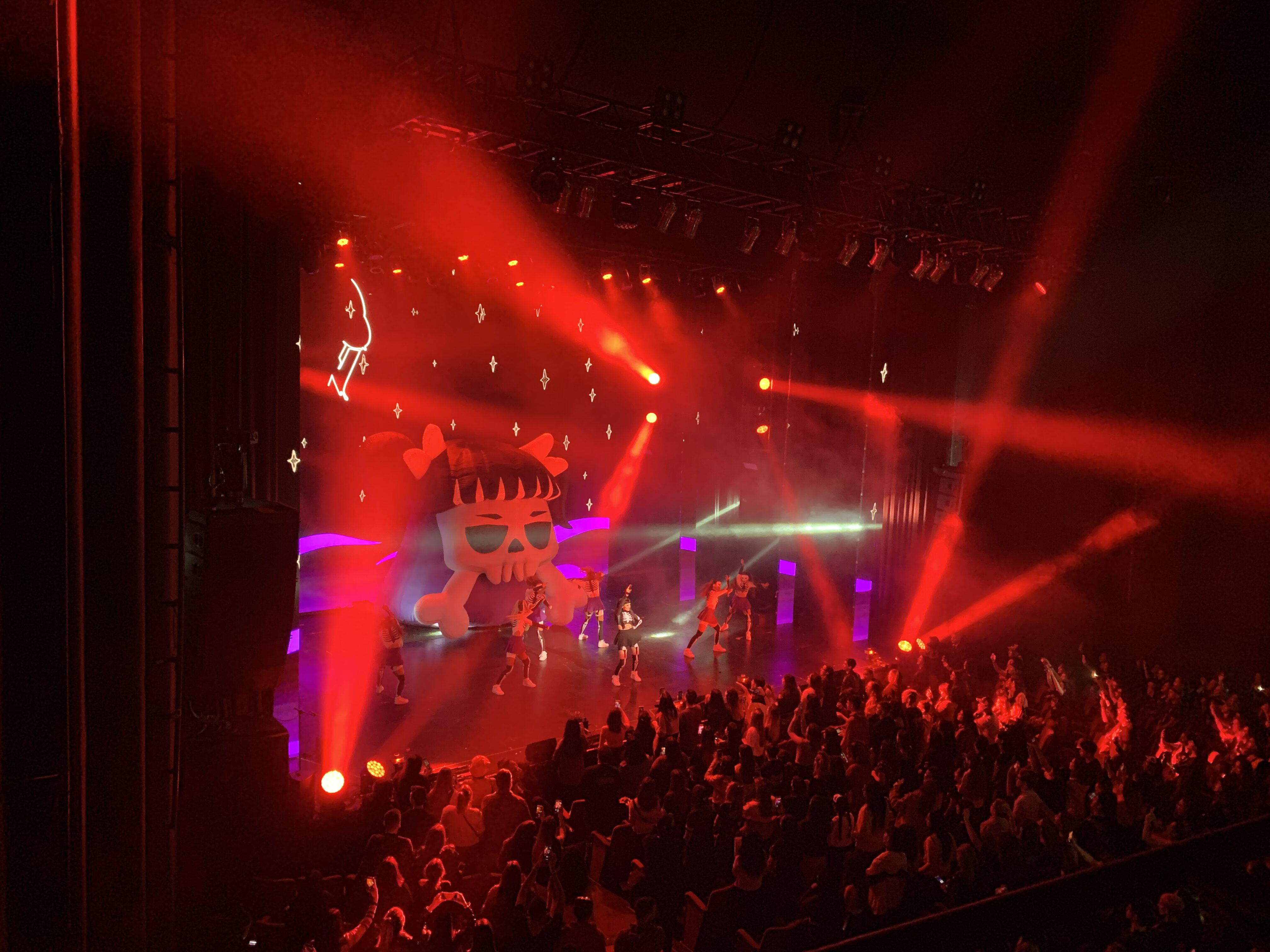 Cazzu presenta Error 93 en el Teatro Ópera, septiembre 2020.